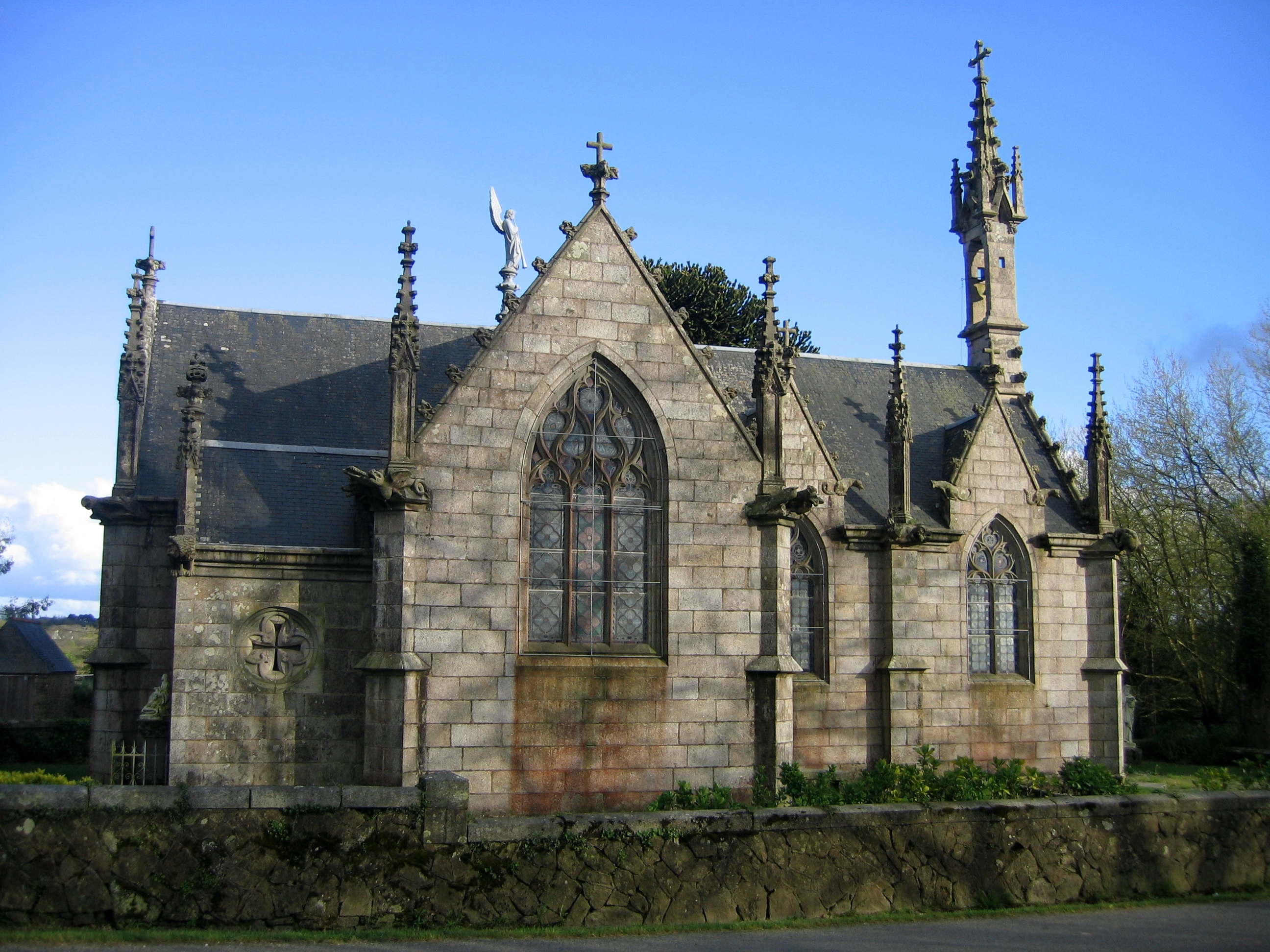 La chapelle Saint-Jacques sur la commune de Guiclan dans le Finistère - France